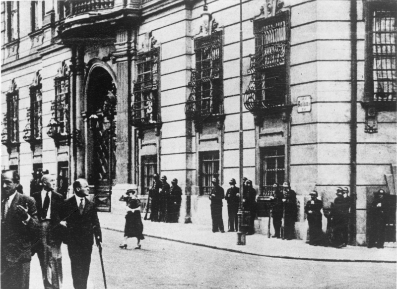 Das Bundeskanzleramt wird von Polizisten zerniert.